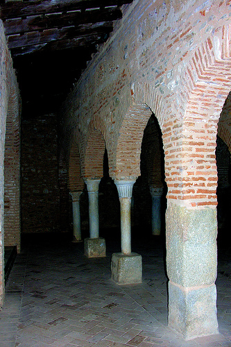 Vue intérieure de la Mosquée d'Almonaster la Real